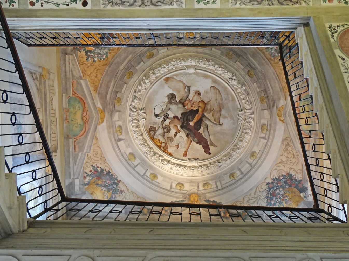 Le plafond du grand escalier du casino Zane Au centre, La Vérité, toute nue comme il se doit, est dans les bras d'un personnage ailé. Situé dans le quartier de San Stin, le casino Zane, édifié entre 1695 et 1697, fut pendant un siècle le palais de divertissement du palazzo Zane, construit à quelques dizaines de mètres. En 1682, l’atelier de Baldassare Longhena – célèbre architecte du baroque vénitien, achève la restructuration du palazzo Zane commandée par Dominico Zane. A la mort de ce dernier, son neveu et héritier Marino Zane. initie la construction du casino et de la bibliothèque pour préserver les collections de son oncle, qu’il s’était employé à enrichir. L’architecte Antonio Gaspari, issu de l’atelier de Longhena, eut pleine liberté pour concevoir le casino. À sa mort, son assistant Domenico Rossi poursuivit ses projets, épaulé par des artistes de renom. La décoration intérieure, très riche, est ainsi attribuée au célèbre stucateur Abbondio Stazio et la balustrade en bois qui surplombe la salle de bal proviendrait de l’atelier du sculpteur Andrea Brustolon. Les fresques sont – depuis peu – attribuées à Sebastiano Ricci. En 2006 une étude historique a été réalisée, en lien avec la Surintendance des beaux-arts de Venise et, en 2007, un vaste chantier de restauration a été engagé par la Fondation Bru. Le projet est double : réhabiliter le bâtiment dans l’esprit de l’époque et y créer un lieu dédié à la musique, qui était sa finalité première. La fondation Palazzetto Bru Zane – Centre de musique romantique française a été créée en janvier 2008 pour redonner vie à ce lieu grâce à la musique. Extraits du site officiel